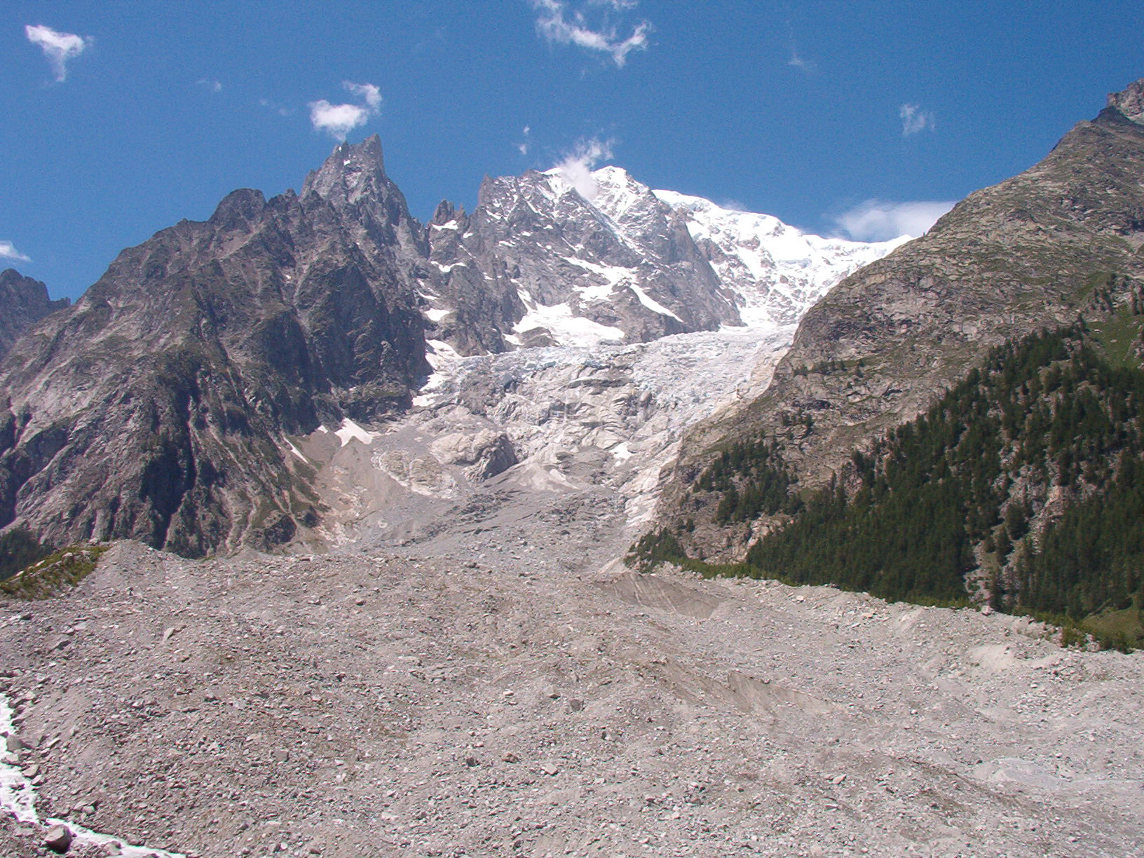 Ghiacciaio della Brenva - Monte Bianco - Valle d'Aosta - Italia